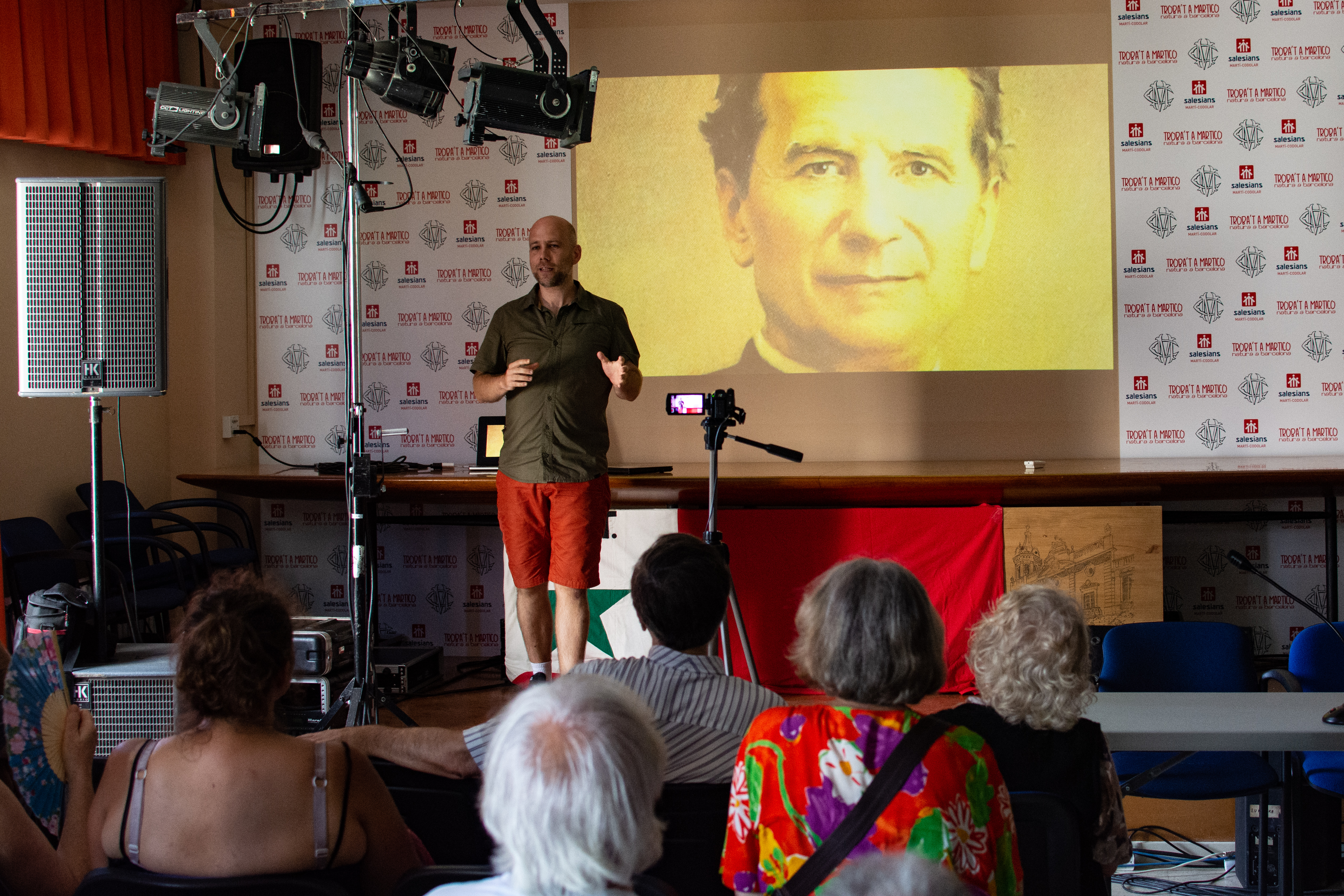 Prezento de Xavi Alcalde dum la SAT-Kongreso 2019